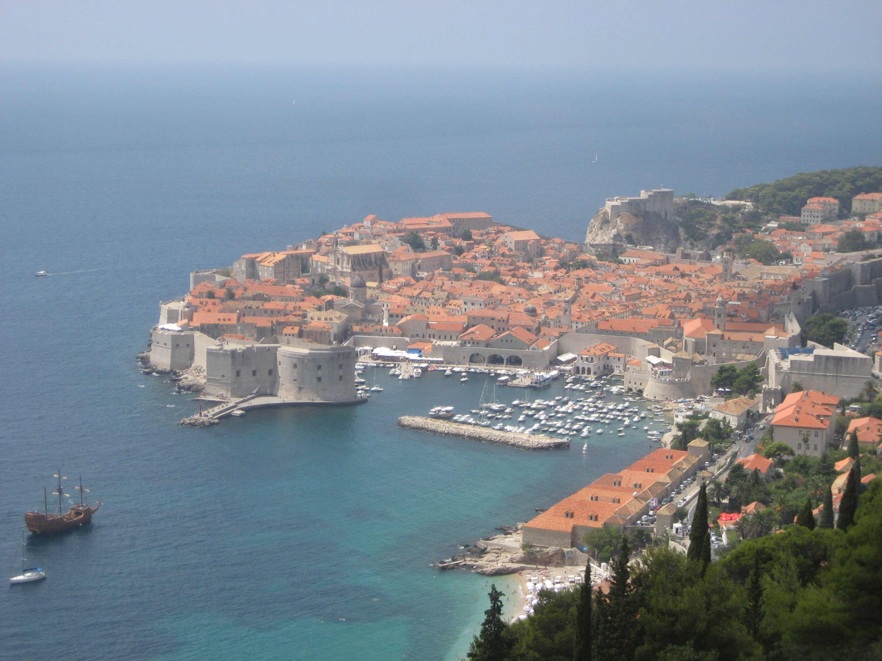 Boarisch: De Oidstodt vo Dubrovnik.